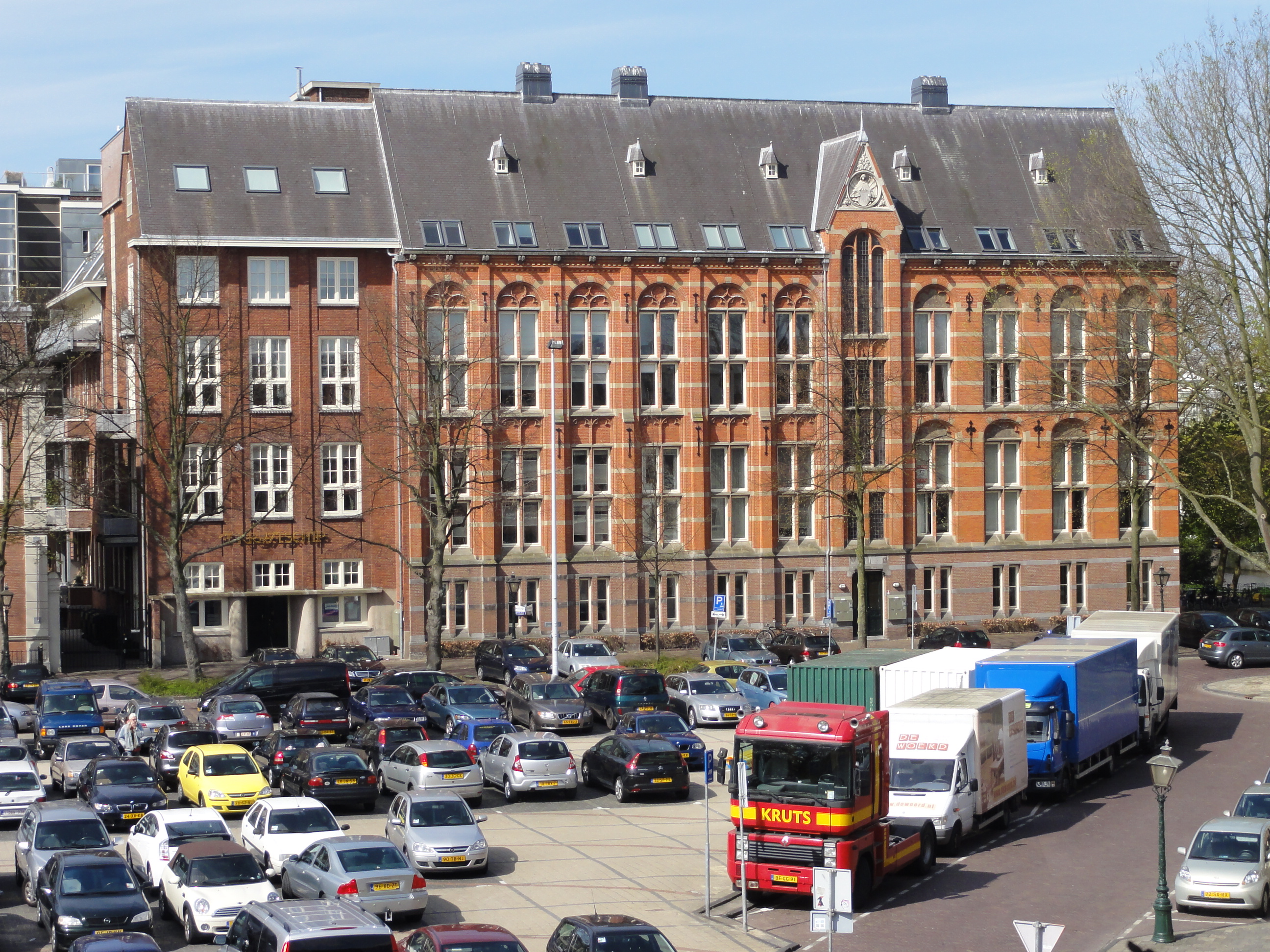 Appartementengebouw 't Kruytschip aan de Garenmarkt te Leiden sinds 2003. Voorheen het Rijksmuseum van Geologie uit 1890.